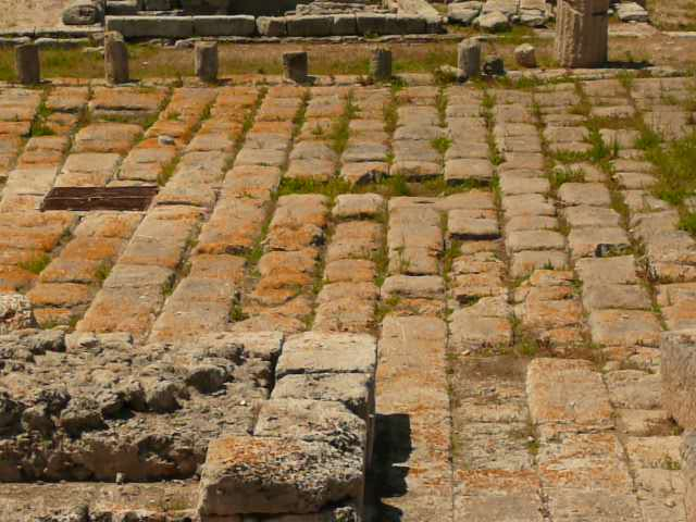 Parque arqueológico de Egnazia, Apulia.